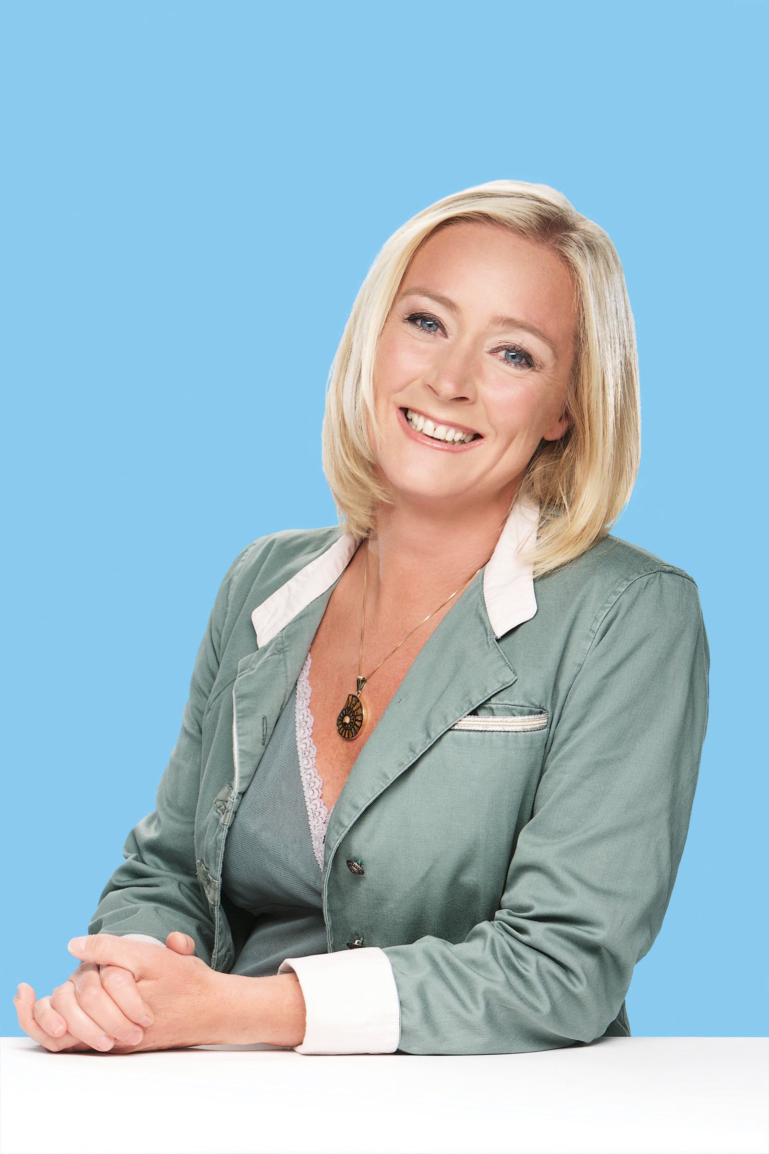 Anne Marie Hoogland, Kandidaat-Kamerlid.